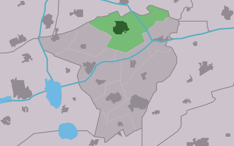 Kaartsje fan himrik fan Bûtenpost